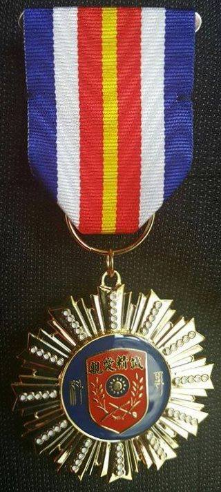 自行拍攝